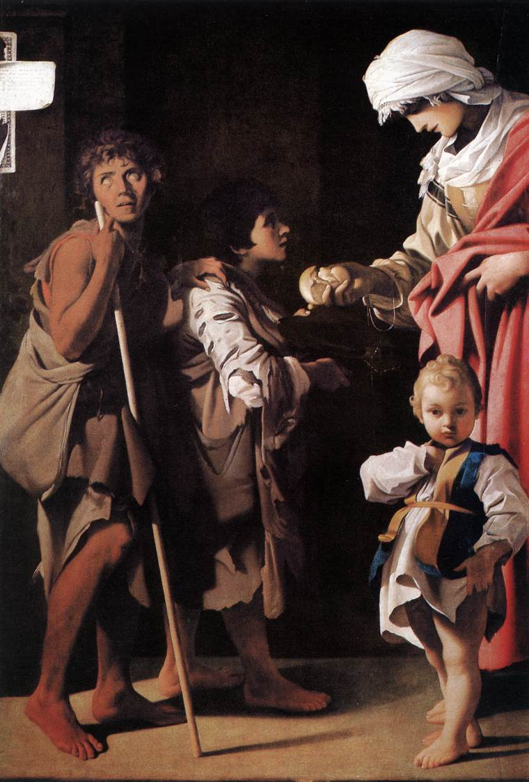 La Carità è un quadro che si trova a Napoli nel Museo di Capodimonte (inv. Q 373), facente parte della Collezione Farnese. Il dipinto gioca sulla contrapposizione tra lo sguardo vuoto del ragazzo cieco a sinistra e quello intensissimo del bambino sulla destra, che fissa a tal punto lo spettatore da mettere ai margini tutti quanti gli altri personaggi, divenendo paradossalmente egli il personaggio principale ed il centro del dipinto.